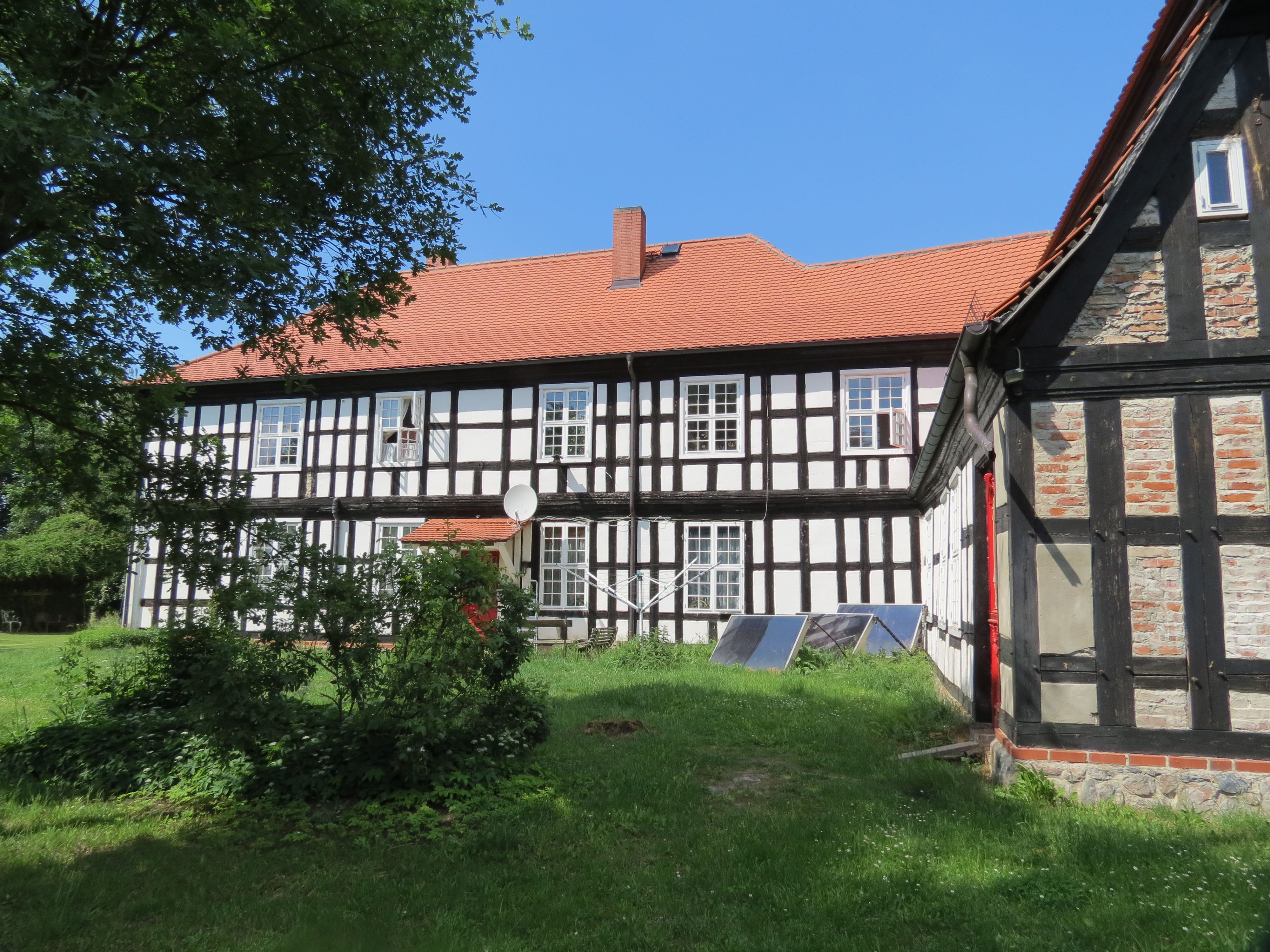 Rohrsches Gutshaus Rittergut Ganzer I, Ganzer, Ortsteil der Gemeinde Wusterhausen/Dosse, Lkr. Ostprignitz-Ruppin, Brandenburg